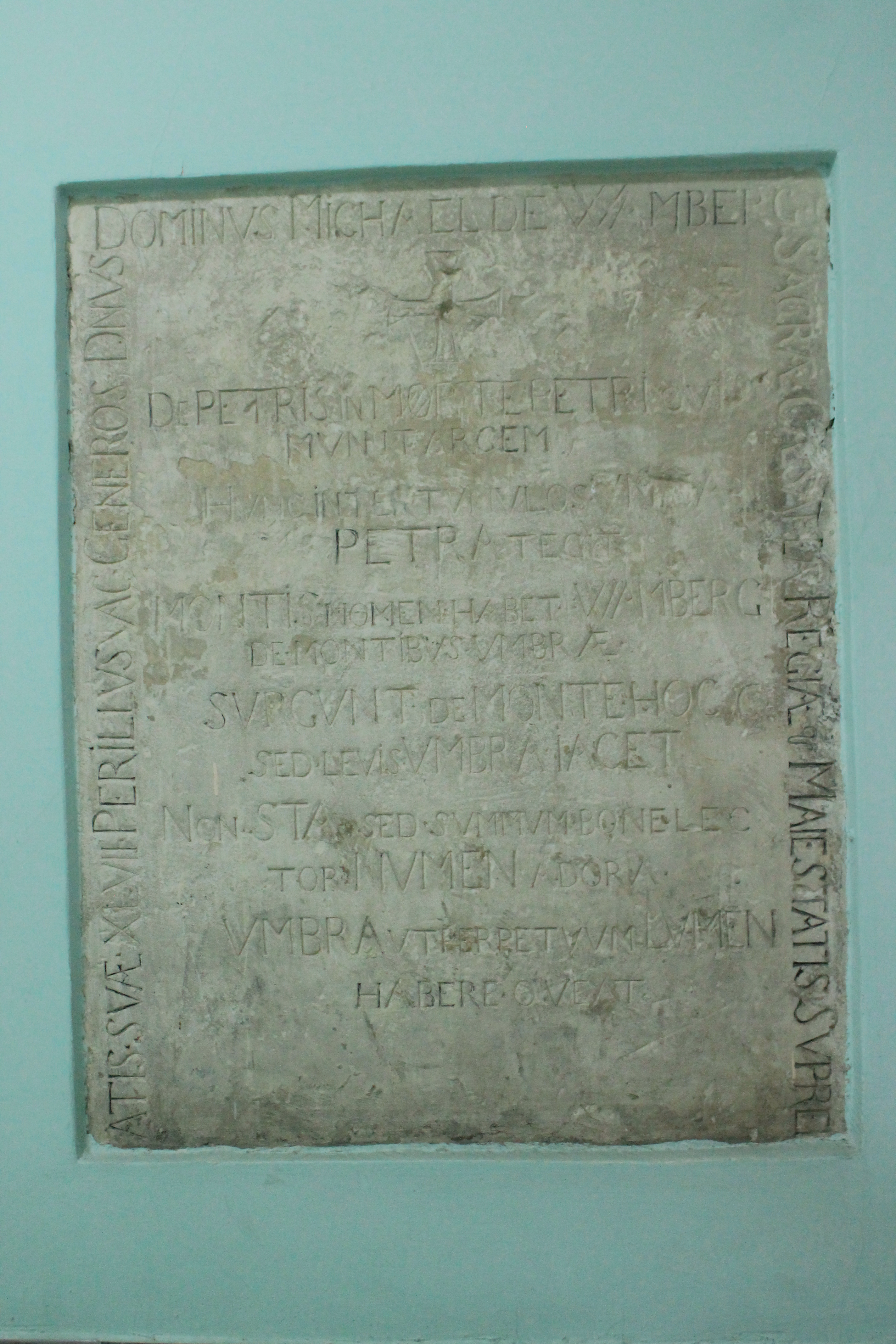 Vojna bolnica Petrovaradin